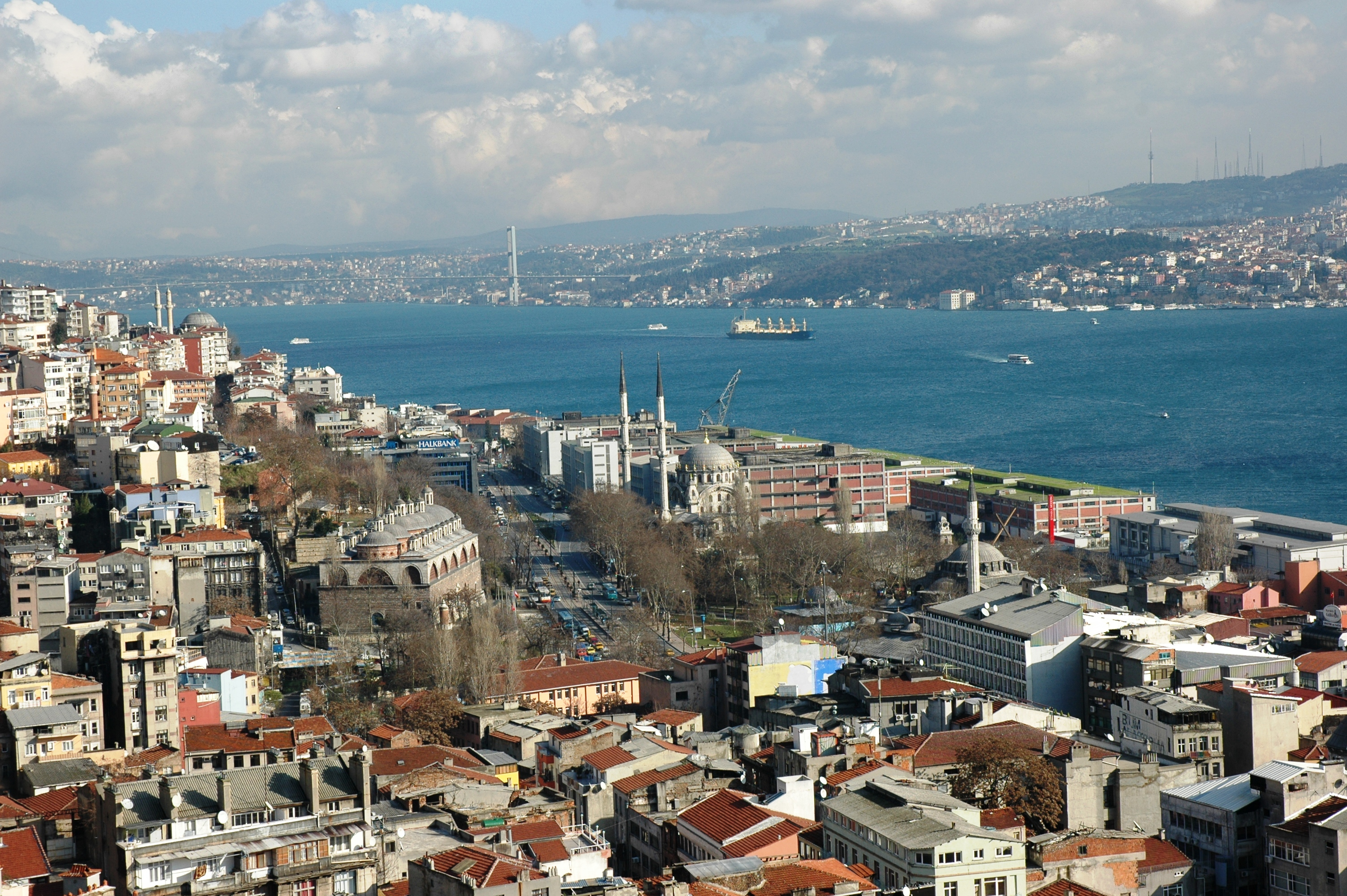 Istanbul - Beyoglu amb el Bòsfor al fons